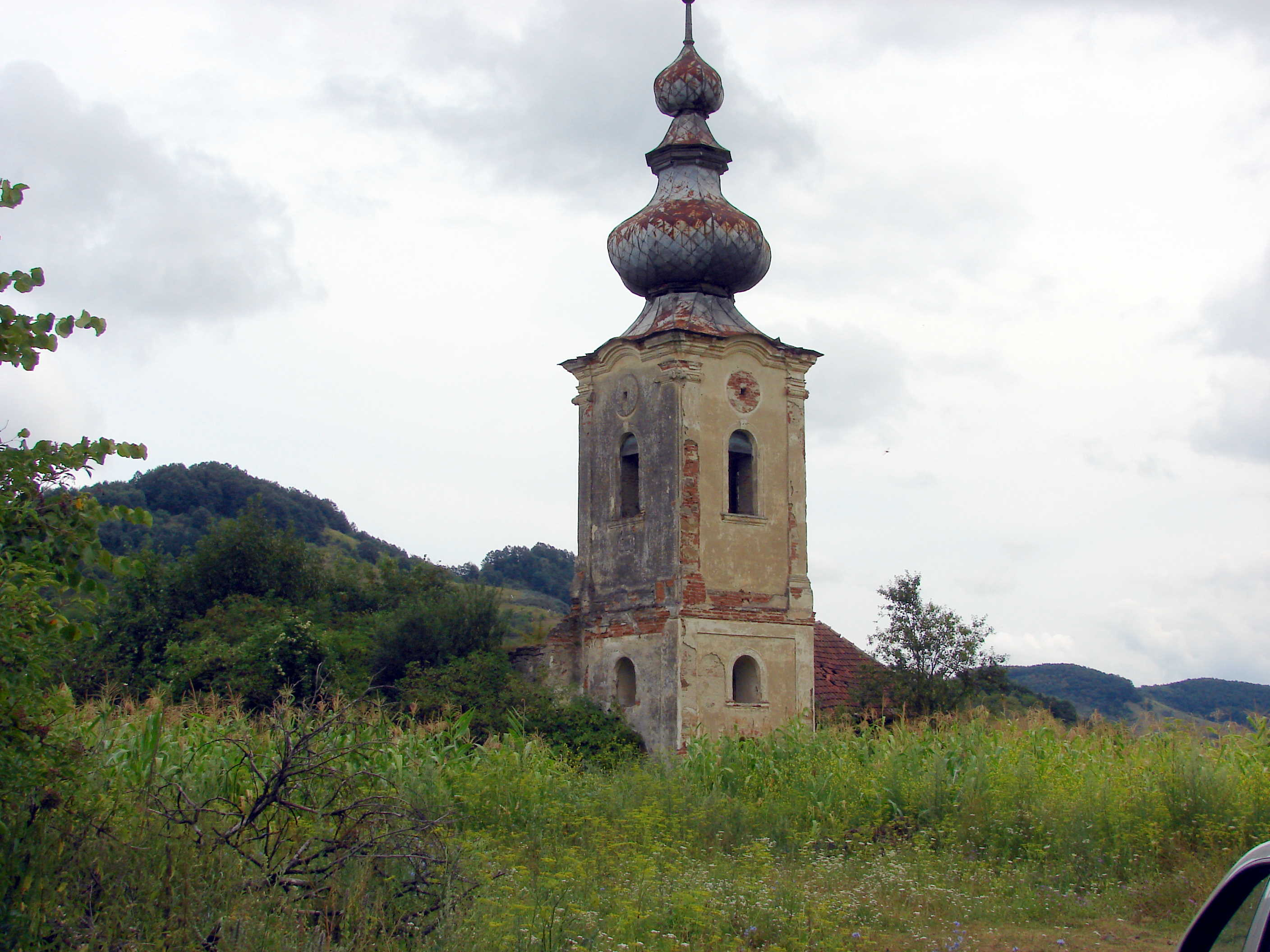 Poza 3